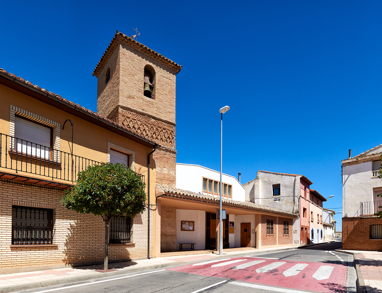 Parròquia de San Miguel Arcangel de Barillas (Navarra)